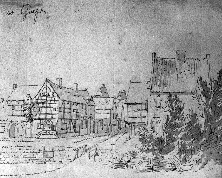 Zicht op Gulpen omstreeks 1670. Pentekening van Josua de Grave in Rijksarchief te Maastricht.